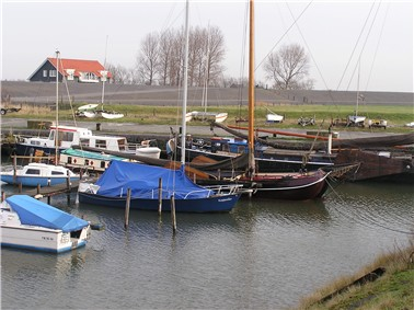 De haven van Battenoord. Eigen foto